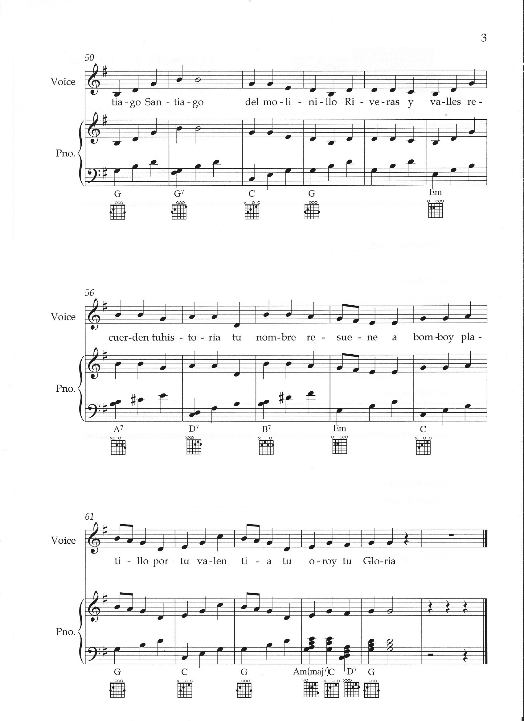 Hoja tercera y última de la partitura elemental del Himno Santiago del Molinillo, en el municipio de Las Omañas (León, España) para voz y piano.